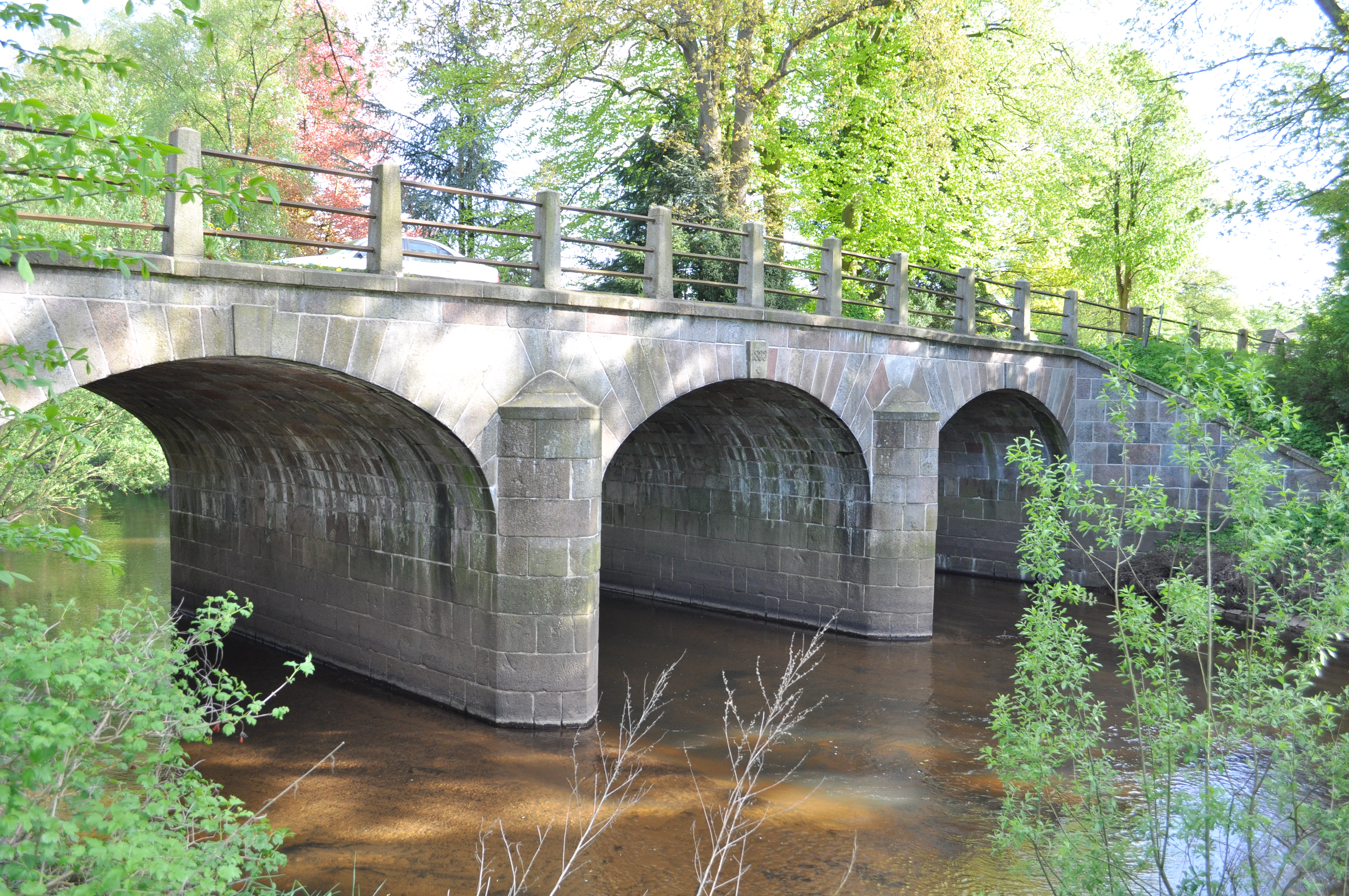 Friedrichsbrücke von 1833 über die Hudau in Bad Bramstedt, Teil der Altona-Kieler-Chaussee. This is a photograph of an architectural monument.